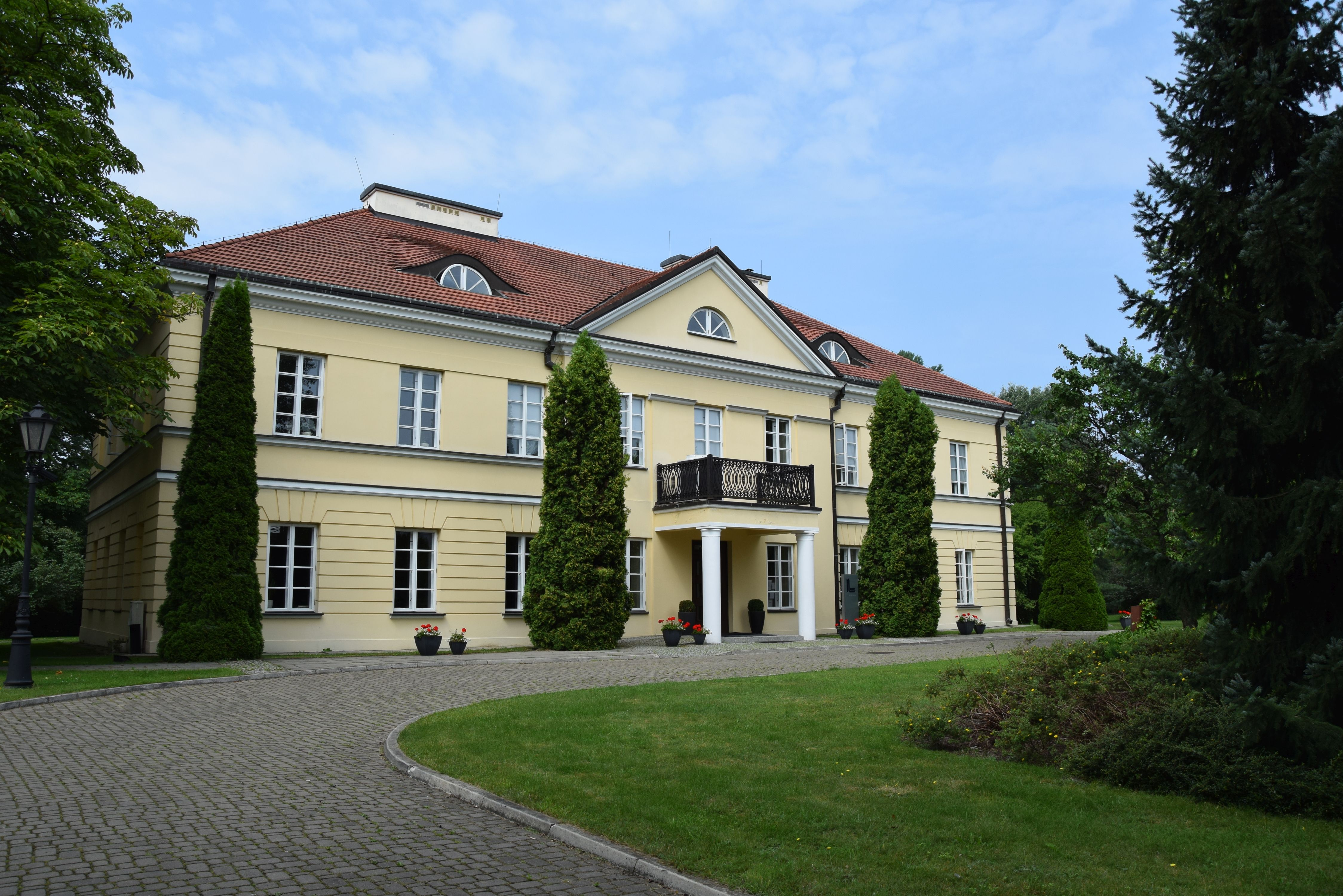 Od roku 2012 Konfederacja Lewiatan ma swoją siedzibę przy ul. Cybulskiego 3 w Warszawie.